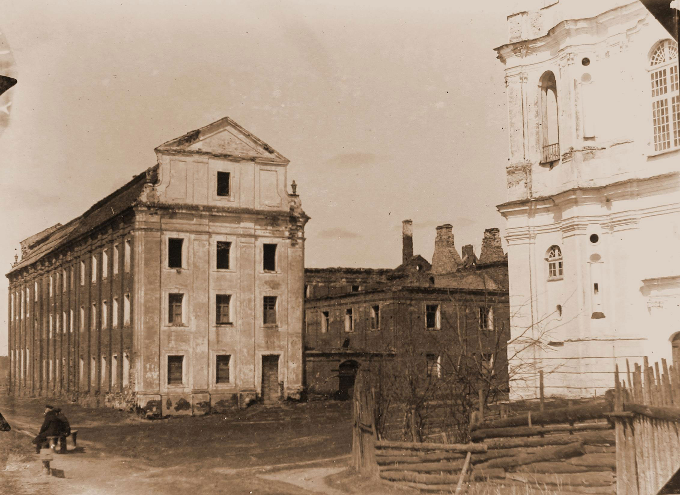 Беларуская (тарашкевіца): Полацак (Połacak), Верхні Замак (Vierchni Zamak). Царква Сьвятой Соф'і і манастыр базылянаў